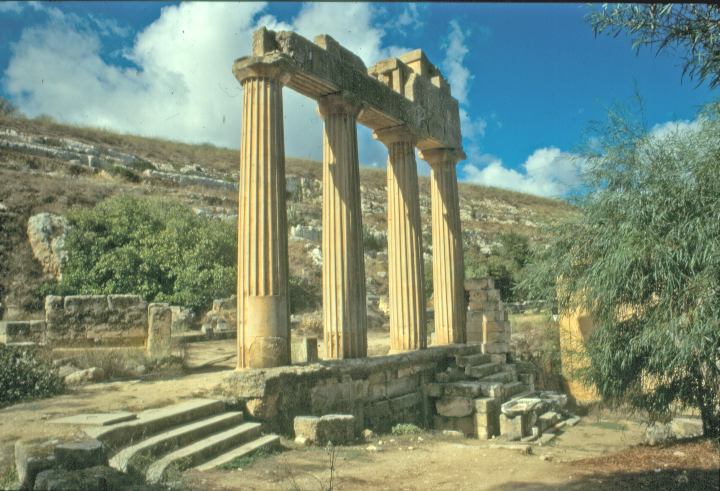 Libia, Cirene (sito archeologico), "Propilei greci"